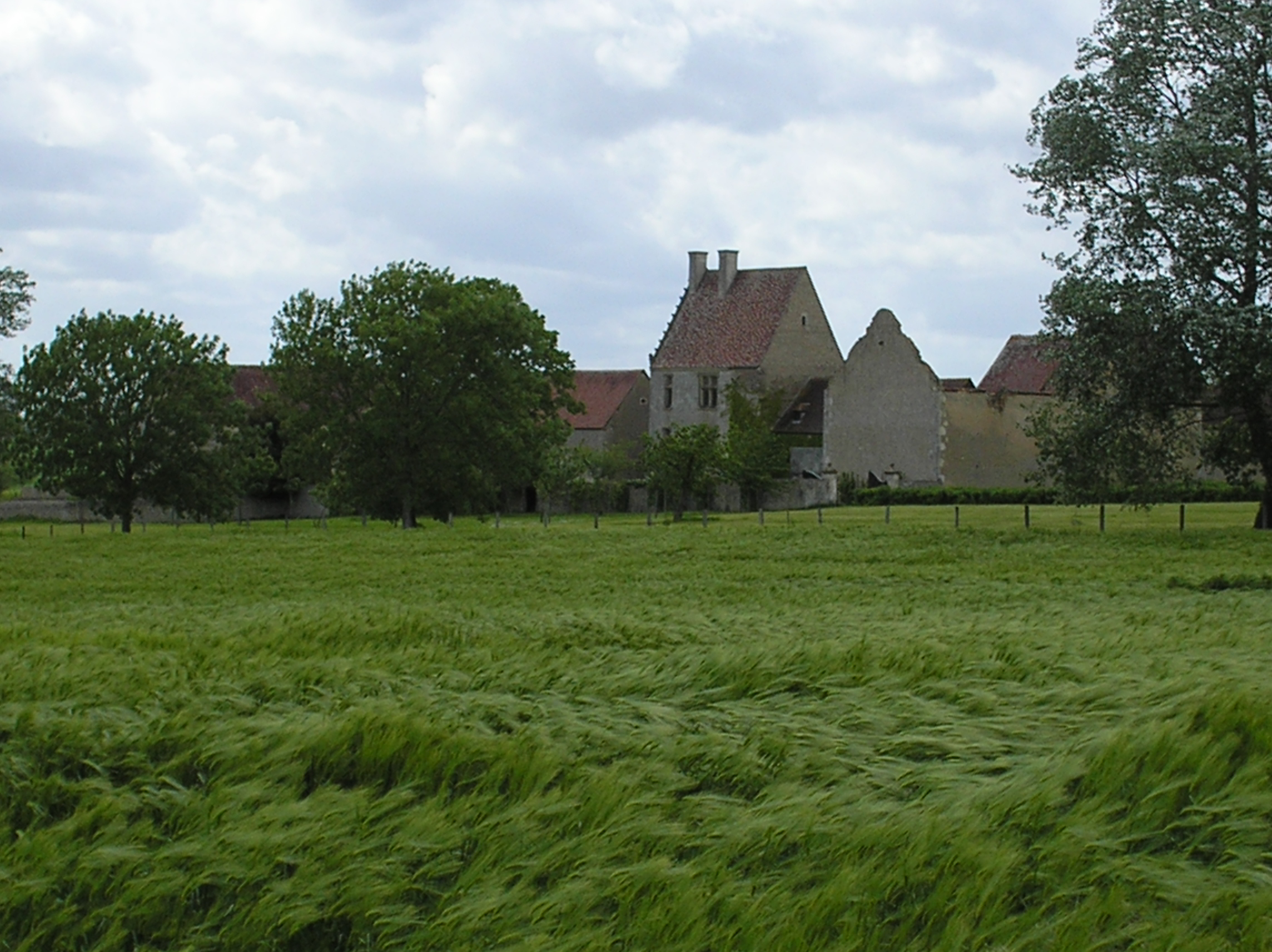 Le Grand Fresnay Les Etilleux